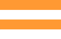 Summary Drapeau de la principauté de Baria Source Nataraja Statut Nataraja Catégorie:Drapeau de principauté des Indes